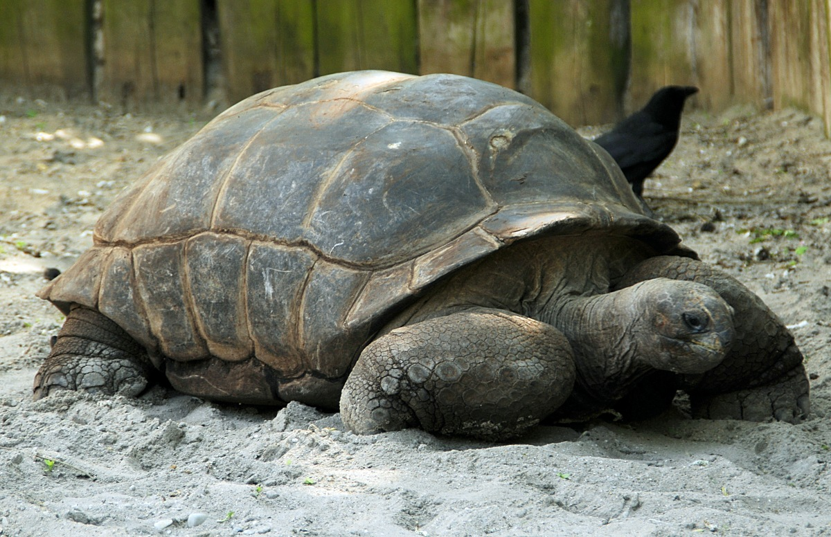 Dipsochelys hololissa, Zoo, Heidelberg, Deutschland